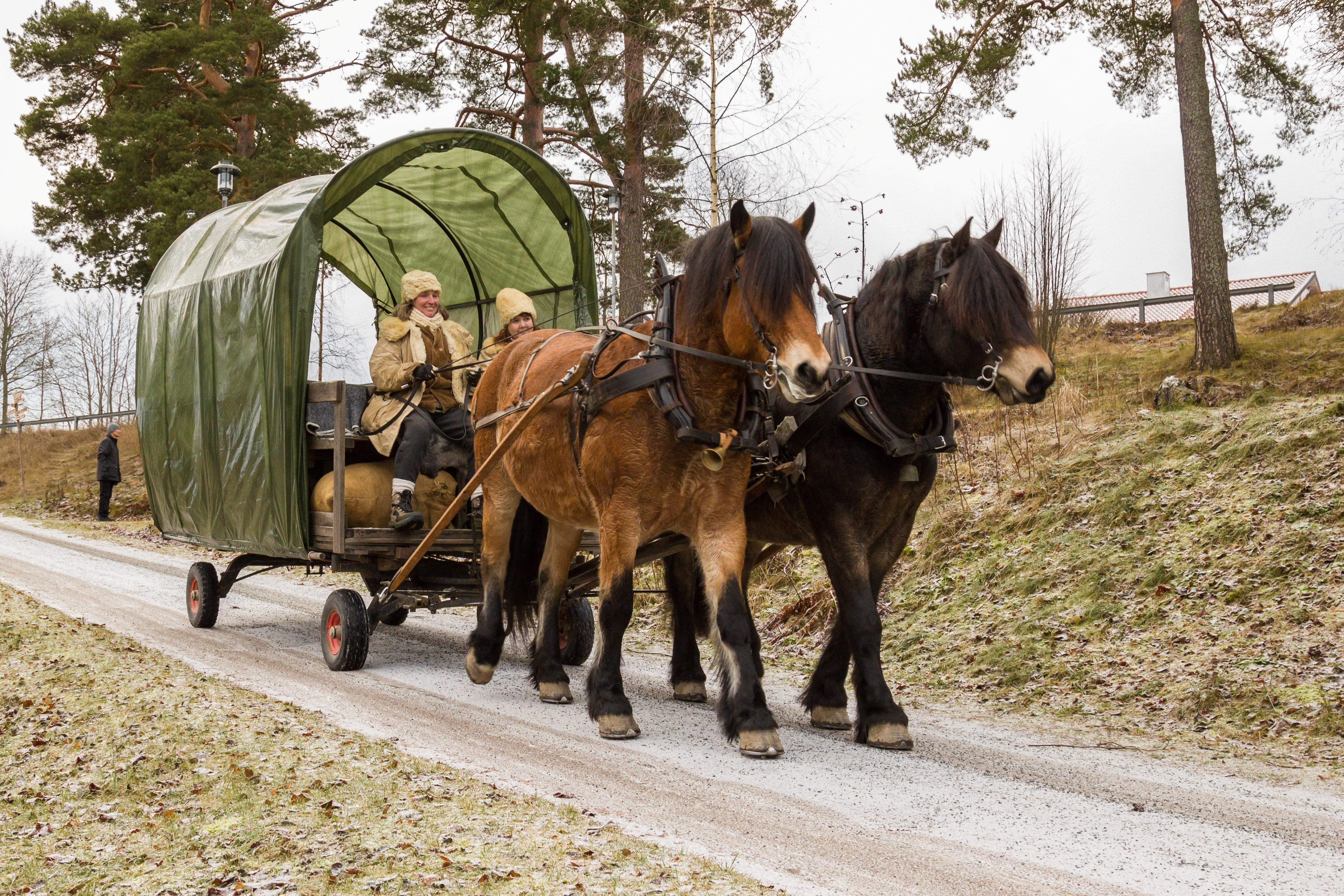 Nordsvenska brukshästar körande vagn på "Julfest på gammelgården", Hedemora gammelgård, Dalarna, Sverige.